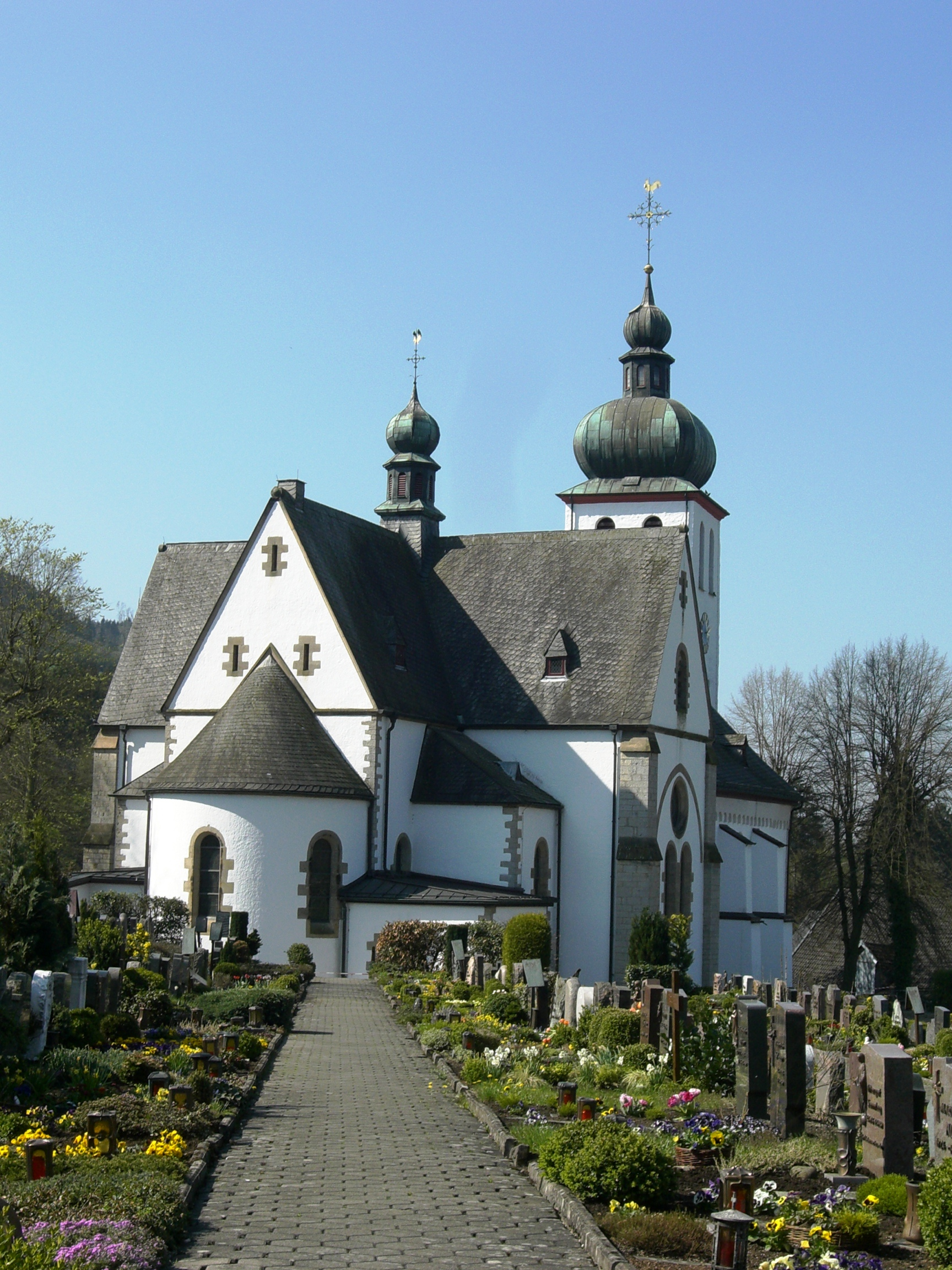 denkmalgeschützte Kirche St. Jakobus d.Ä. in Elspe mit Friedhof